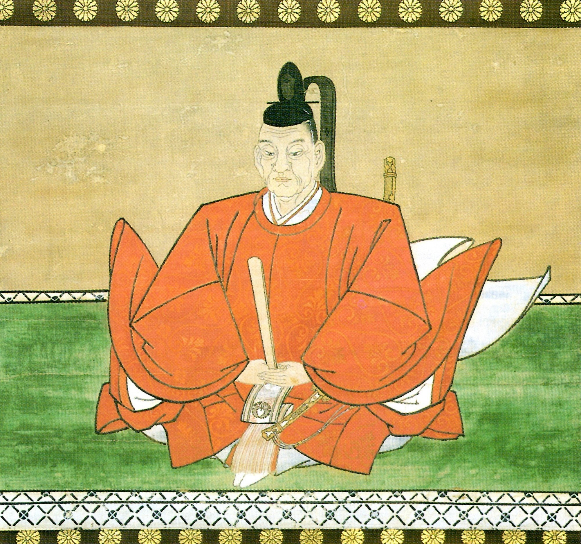 内藤信成の肖像。